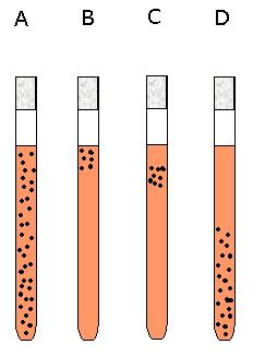 crée par alpha.prim le 17/082006